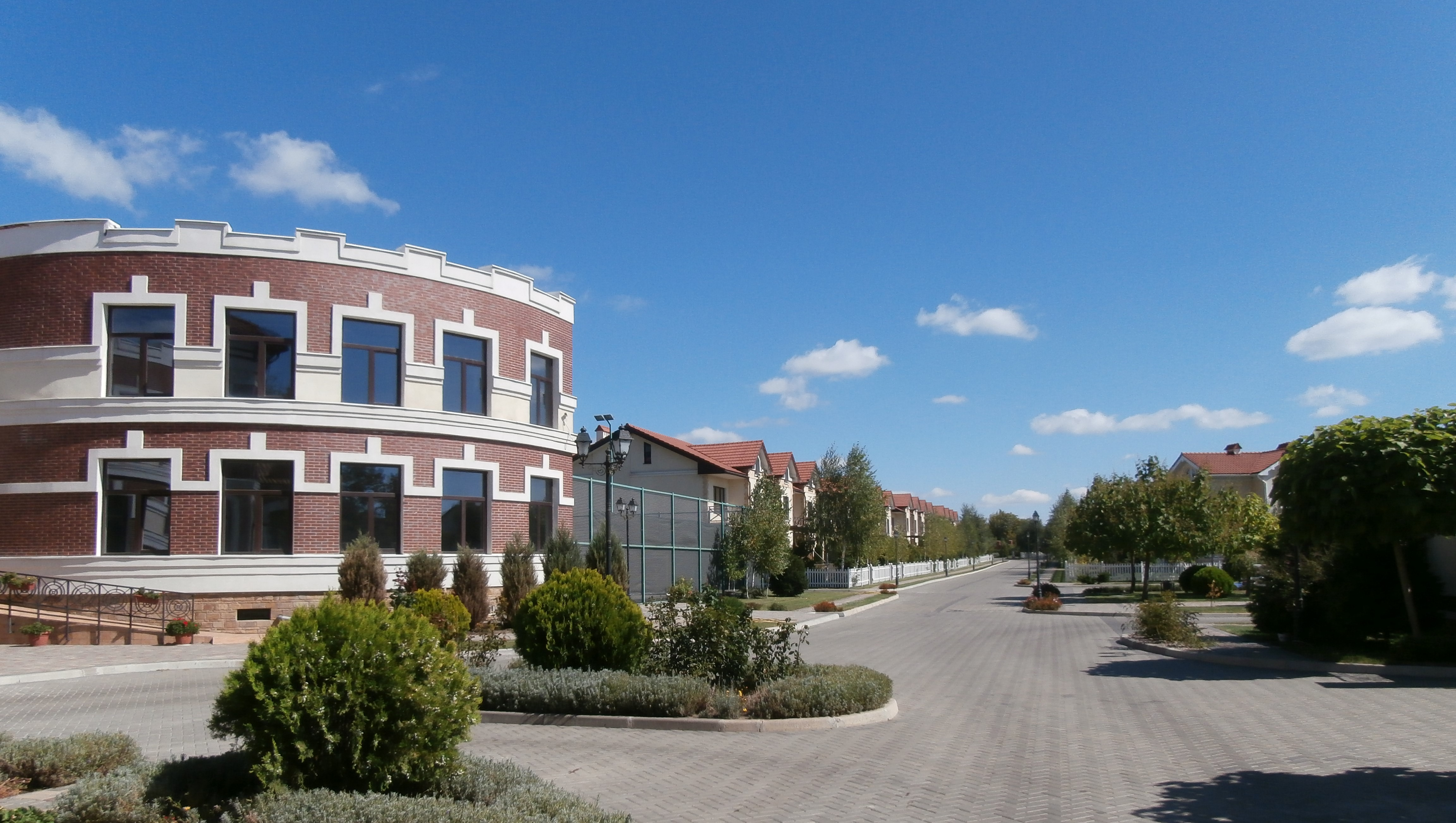 КП "Ариадна"